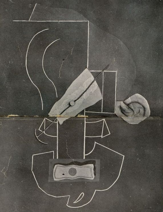 Pintura de Santa-Rita Pintor - Síntese geometral de uma cabeça Colagem sobre papel, 575mm x 485 mm